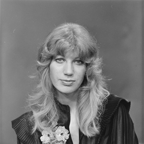 Maggie MacNeal (Sjoukje Smit-van 't Spijker)